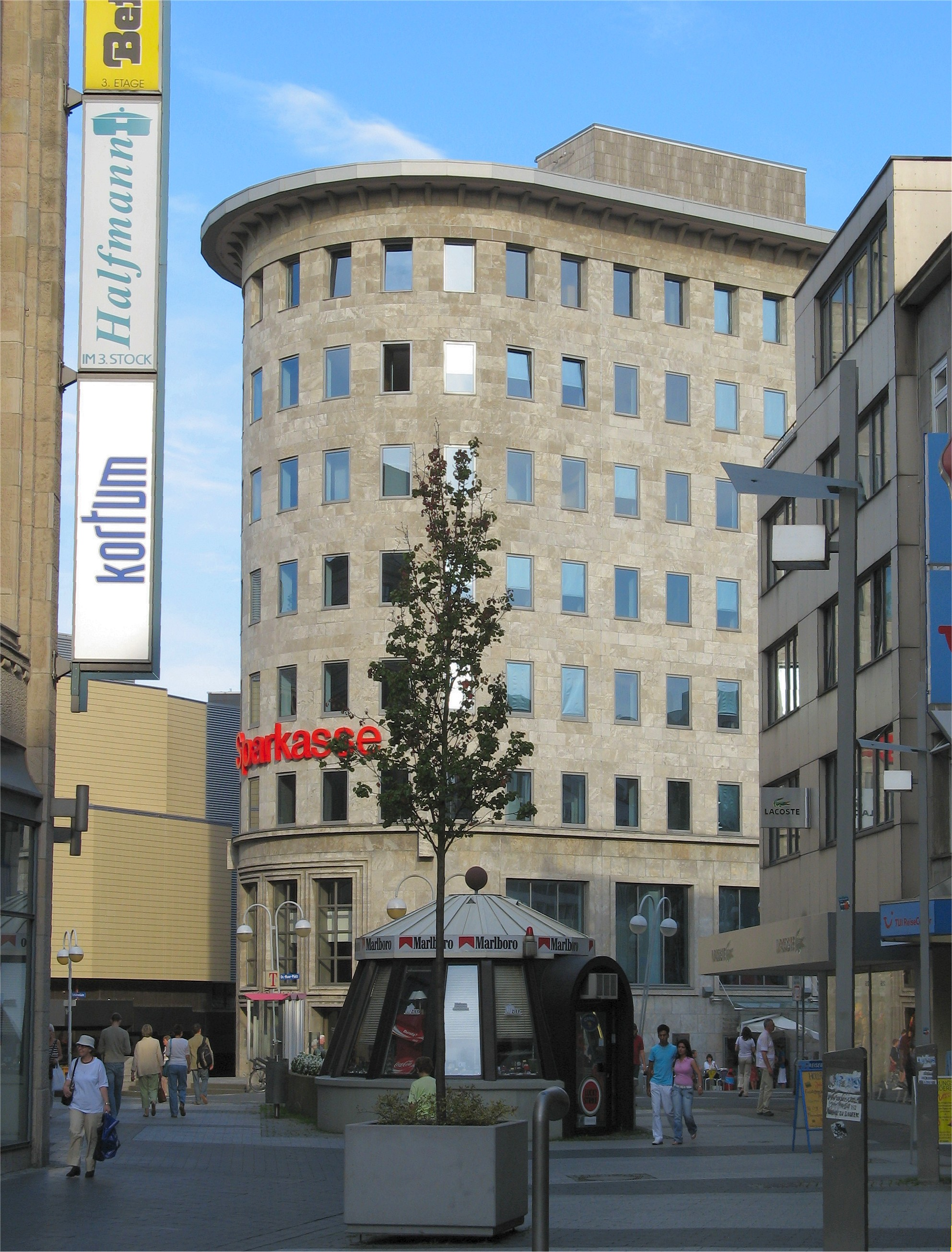 Bochum, Sparkassengebäude am Dr. Ruer-Platz